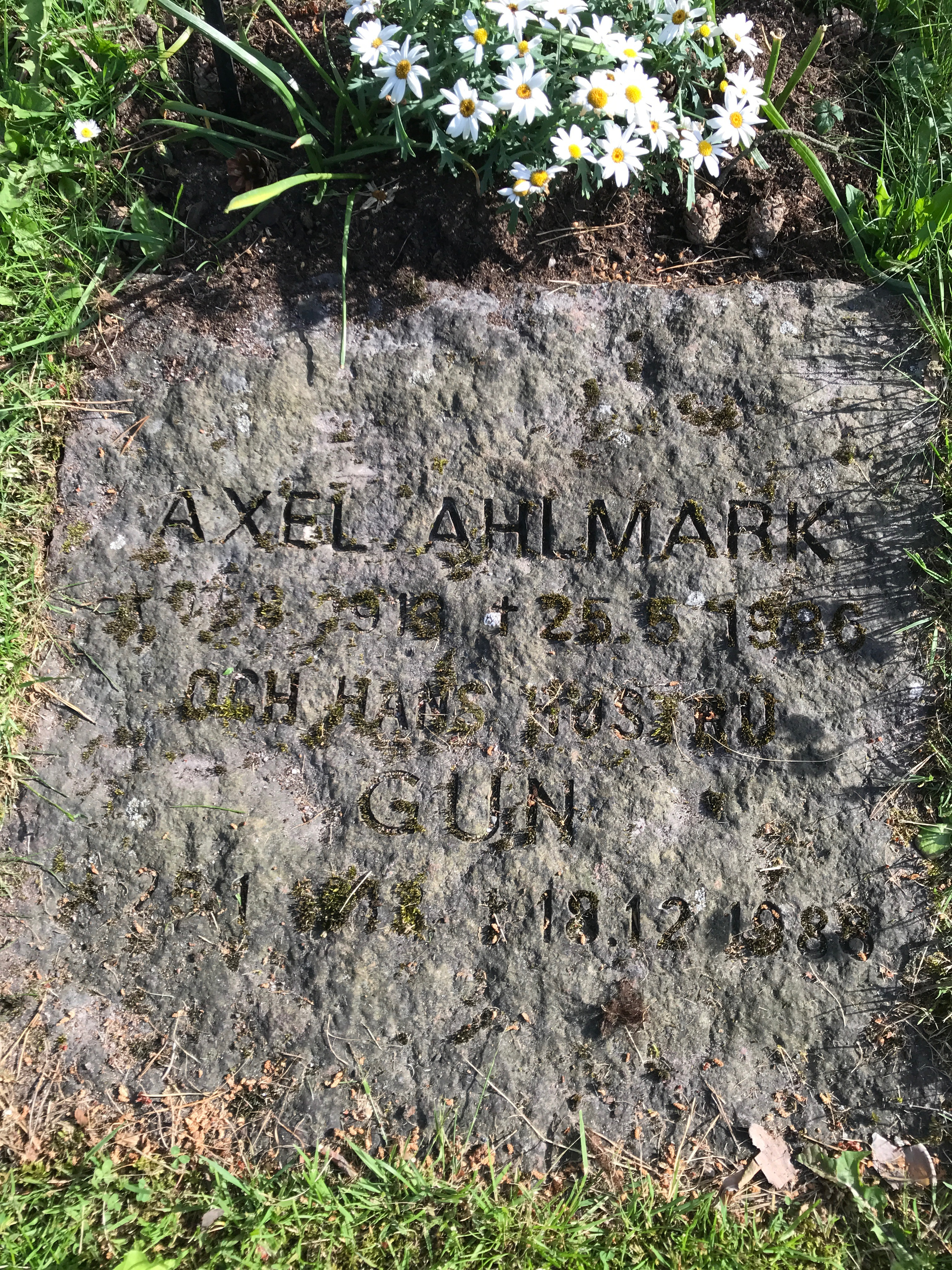 Kv 21c 384